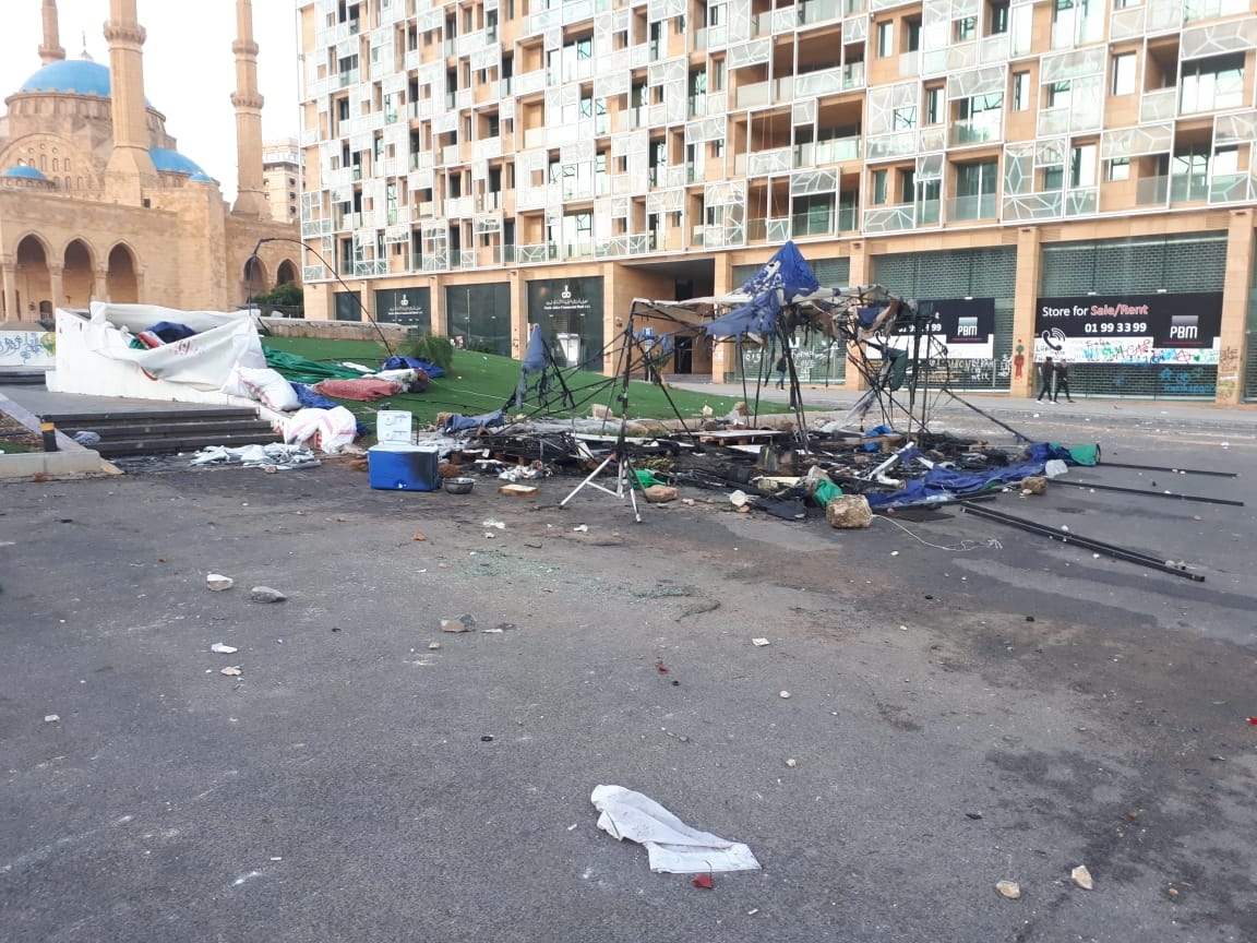 Zerstortes Zelt der Demonstranten in der Beiruter Innenstadt. Aufnahme vom 17. Dezember 2019